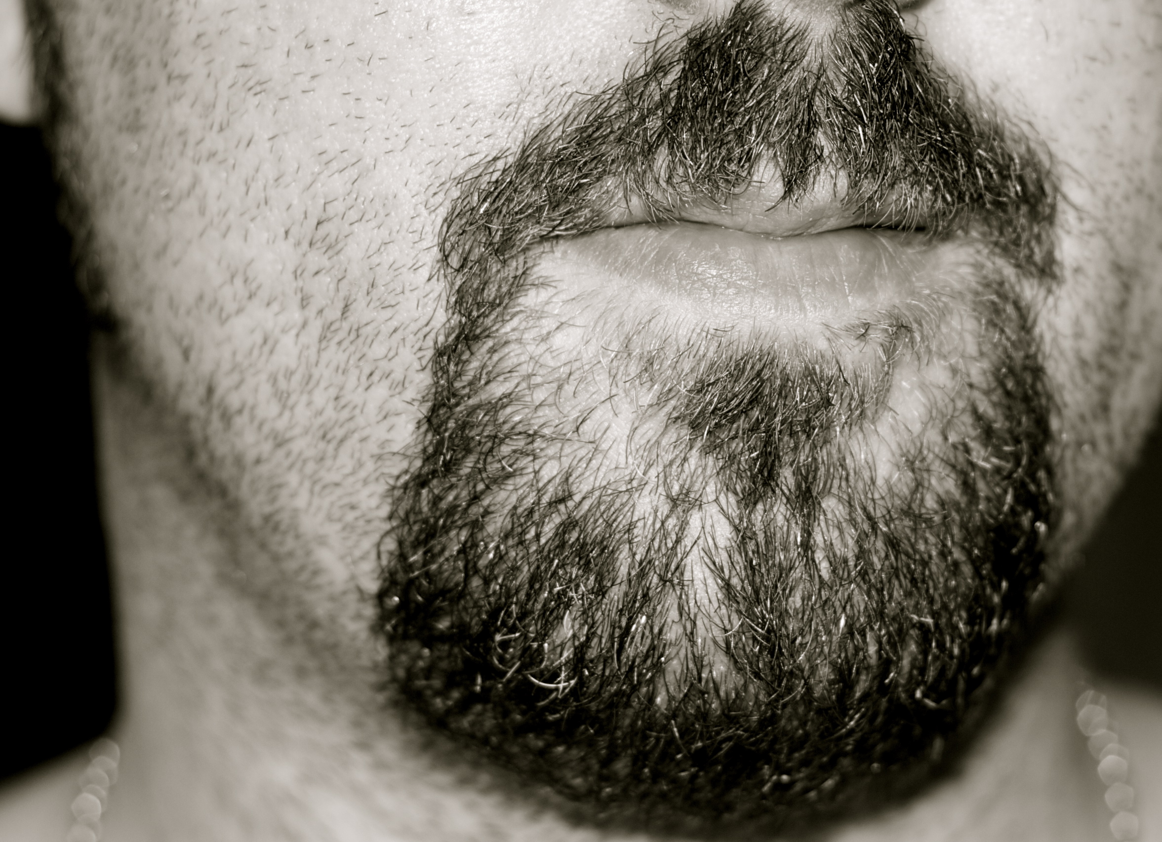 Mi rasgo característico